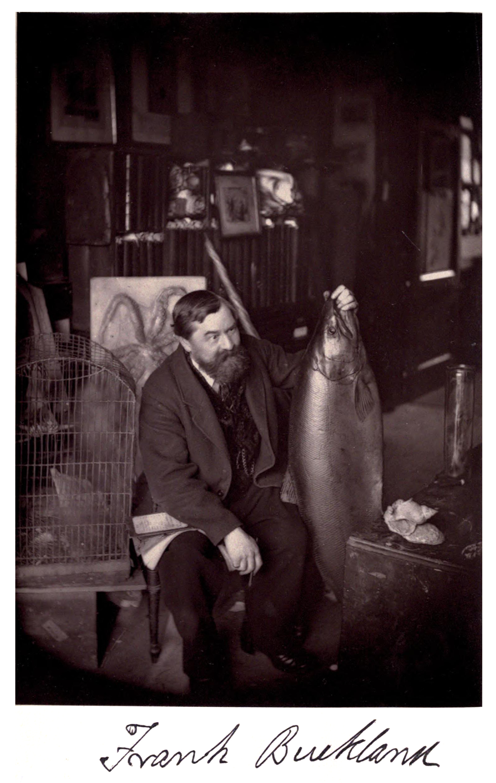 Frank Buckland